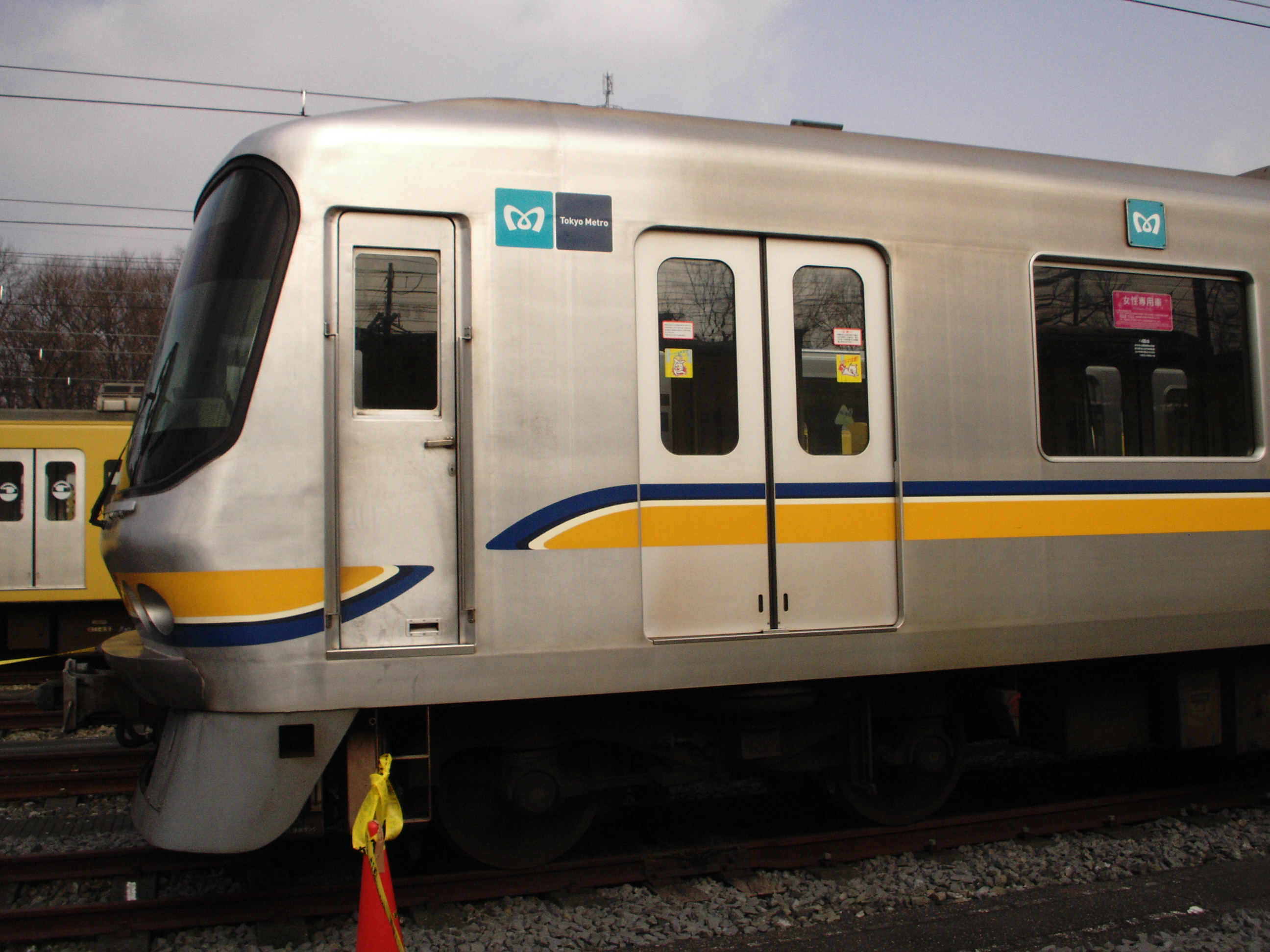 営団07系電車 先頭部側面